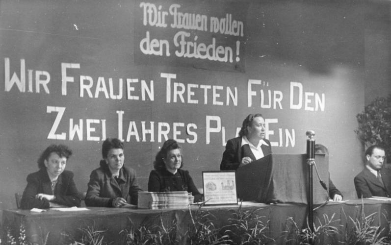 Berlin, Internationale Frauentag Der Internationale Frauentag 1948 in Berlin. Am Internationalen Frauentag, dem 8.März 1949, fanden überall in den Betrieben des sowjetischen Sektors Feierstunden der weiblichen Belegschaftsmitglieder statt. UBz: Im Bekleidungswerk "Fortschritt". Zu den Frauen sprach Lina Fischer vom Demokratischen Frauenbund. Aufn.: Illus / Quaschinsky 2917-49